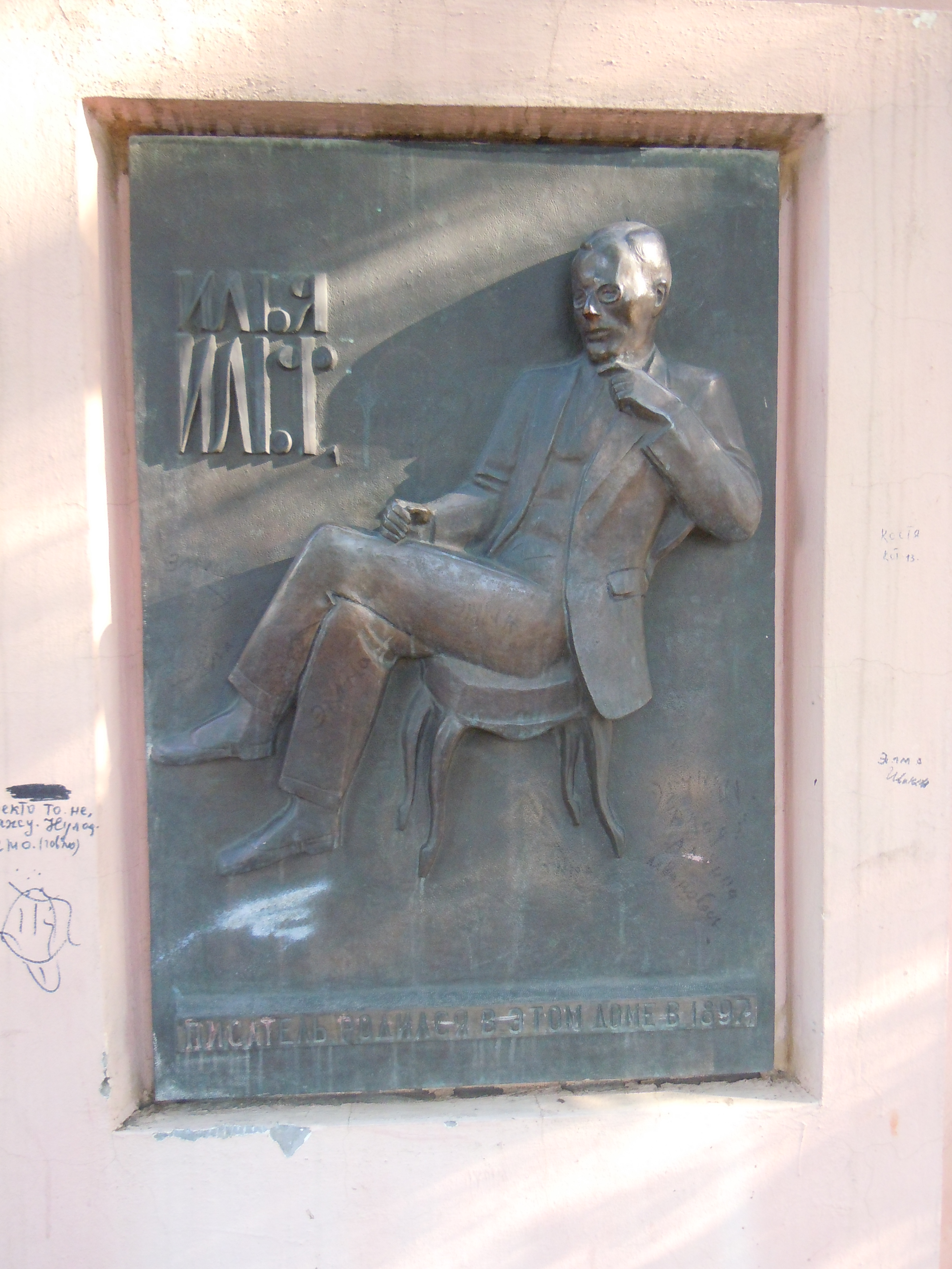 Меморіальна табличка Іллі Ільфу, вул. Старопортофранківська 137, Одеса